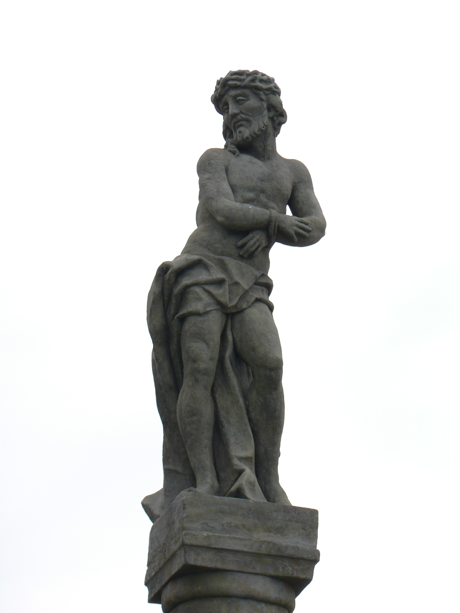 Lanškroun, okres Ústí nad Orlicí. Rokoková socha Ecce homo z roku 1749 u silnice k Lukové.